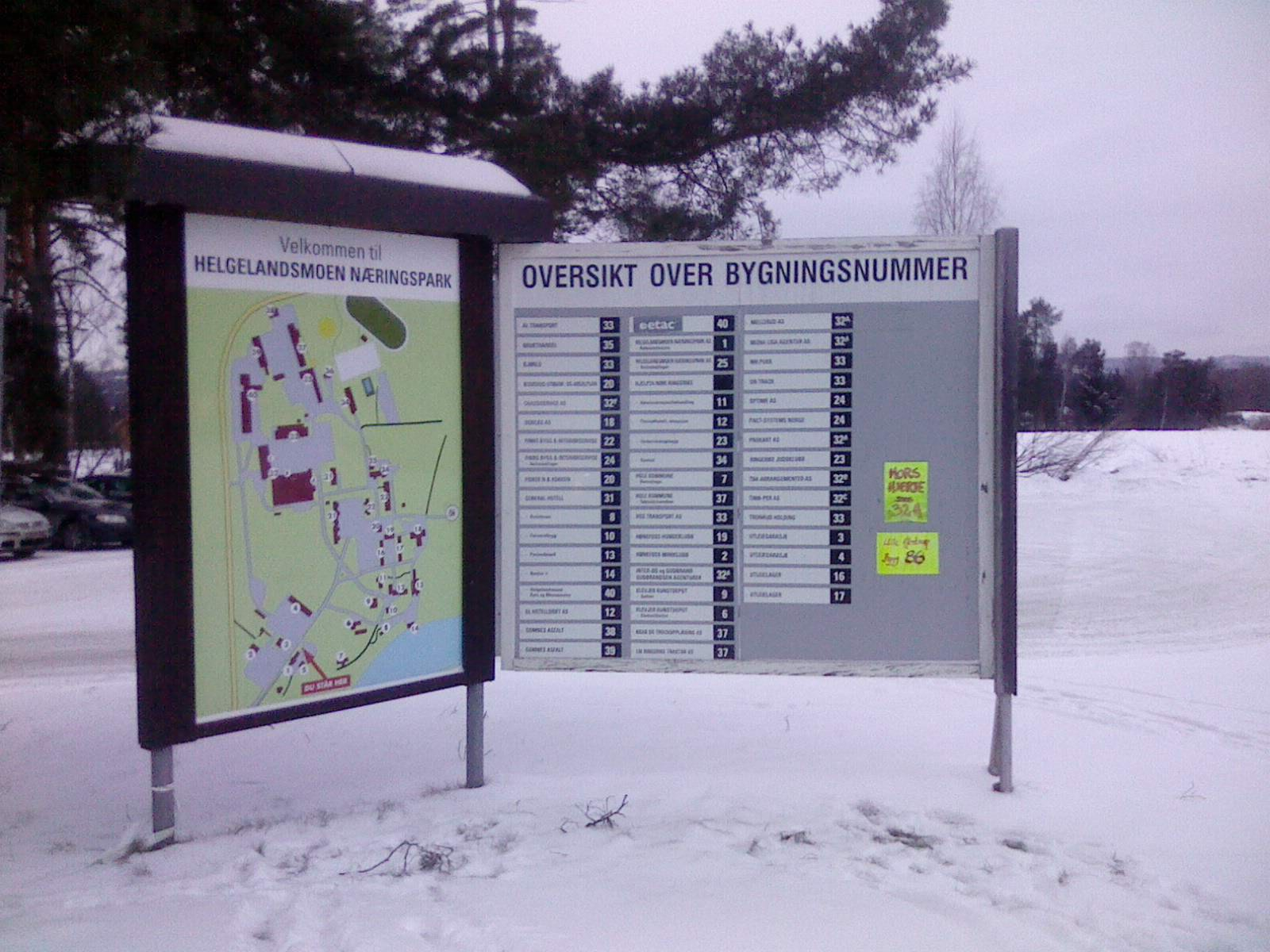 Opplysningstavlen for Helgelandsmoen Næringspark står like innenfor porten, på motsatt side fra der Patruljeveien tar av fra Portveien.